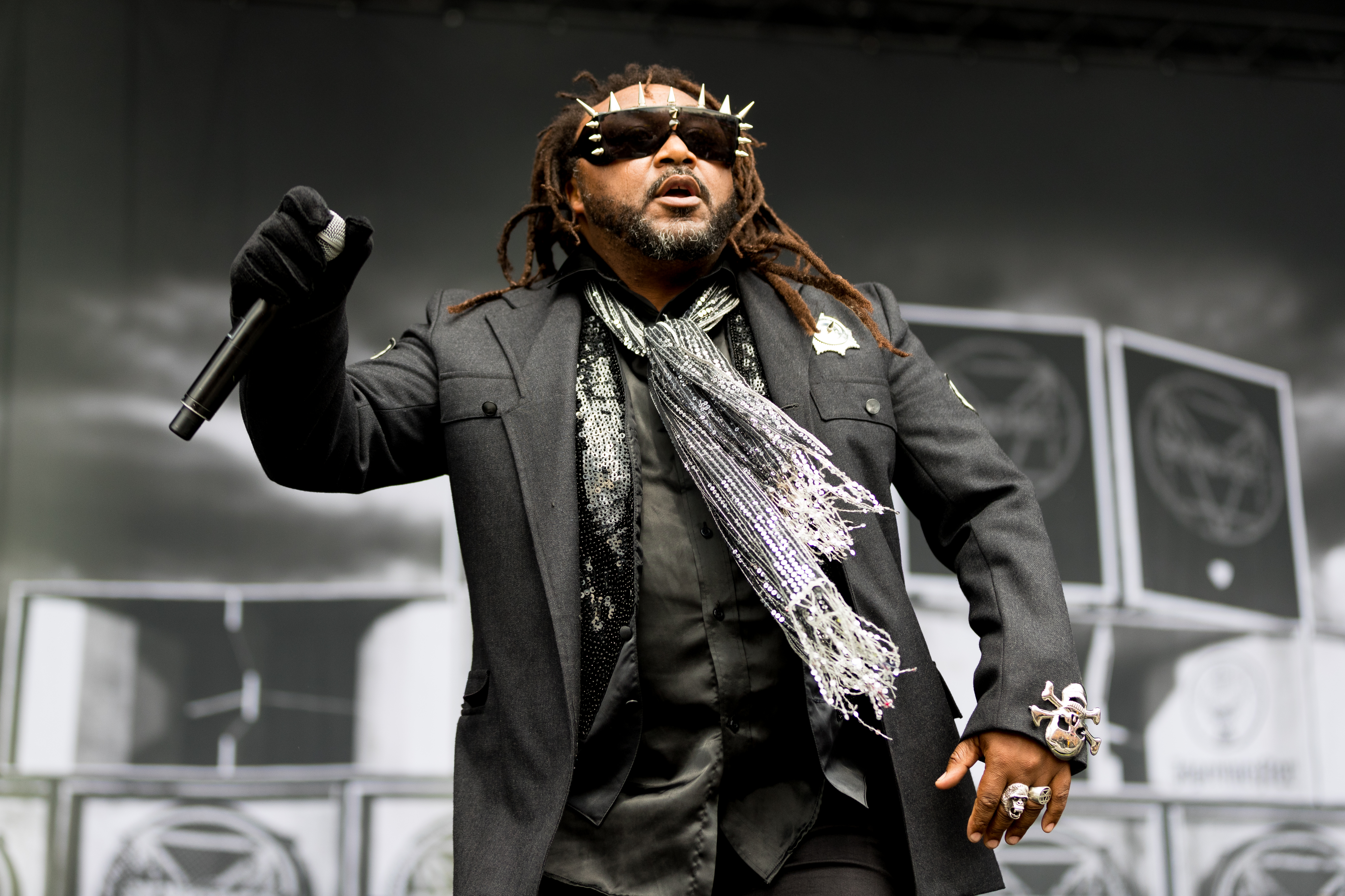 Skindred during Rock am Ring at Nürburgring, Nürnburg, Rheinland Pfalz, Germany on 2017-06-02, Photo: Sven Mandel